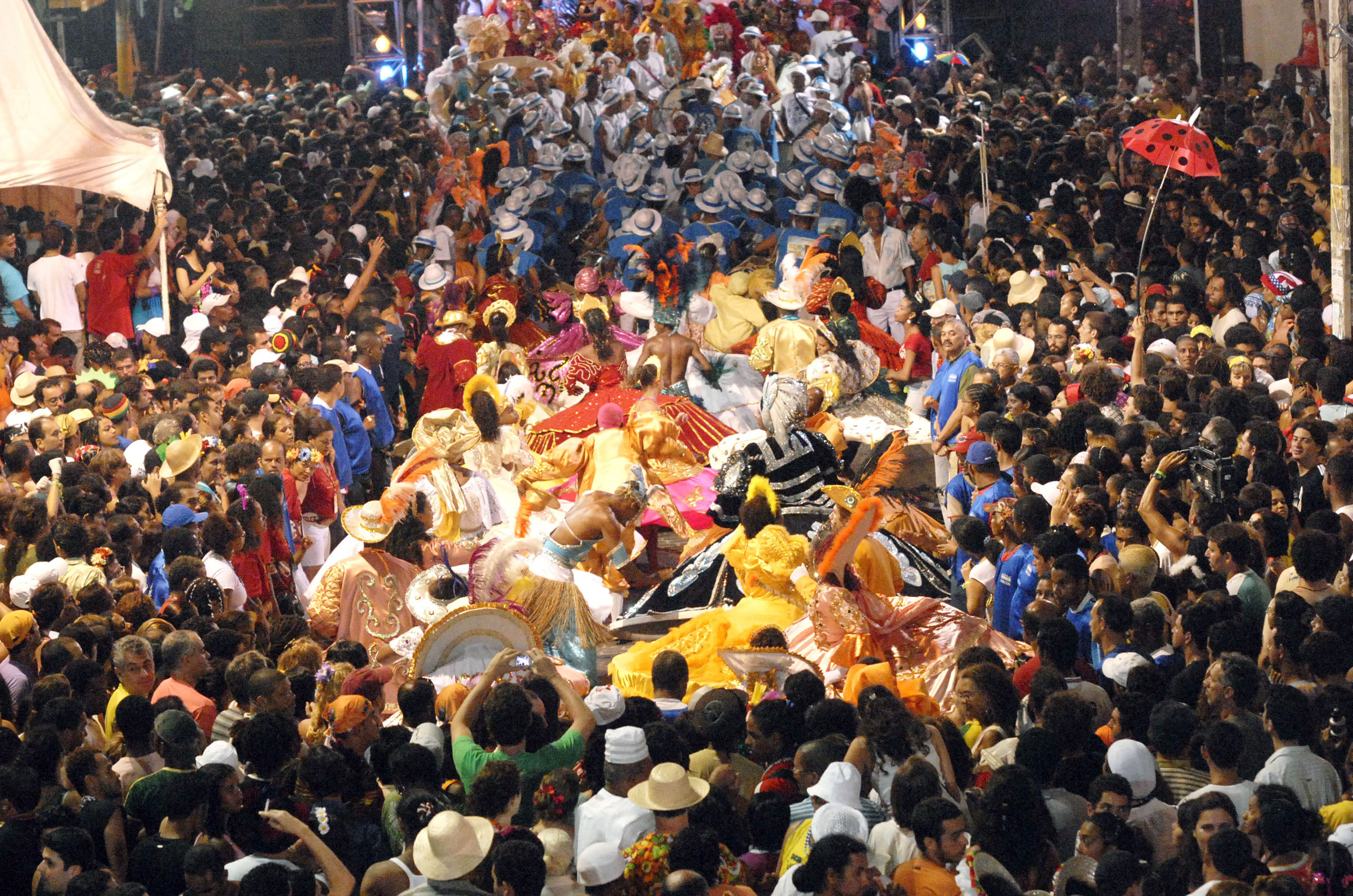 Noite dos tambores silenciosos, Carnaval do Recife, Pernambuco, Brazil